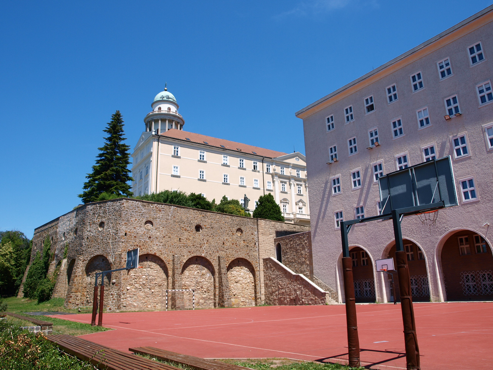 Bencés főapátsági templom (Pannonhalma, Várkerület 1 .) This is a photo of a monument in Hungary. Identifier: 4640